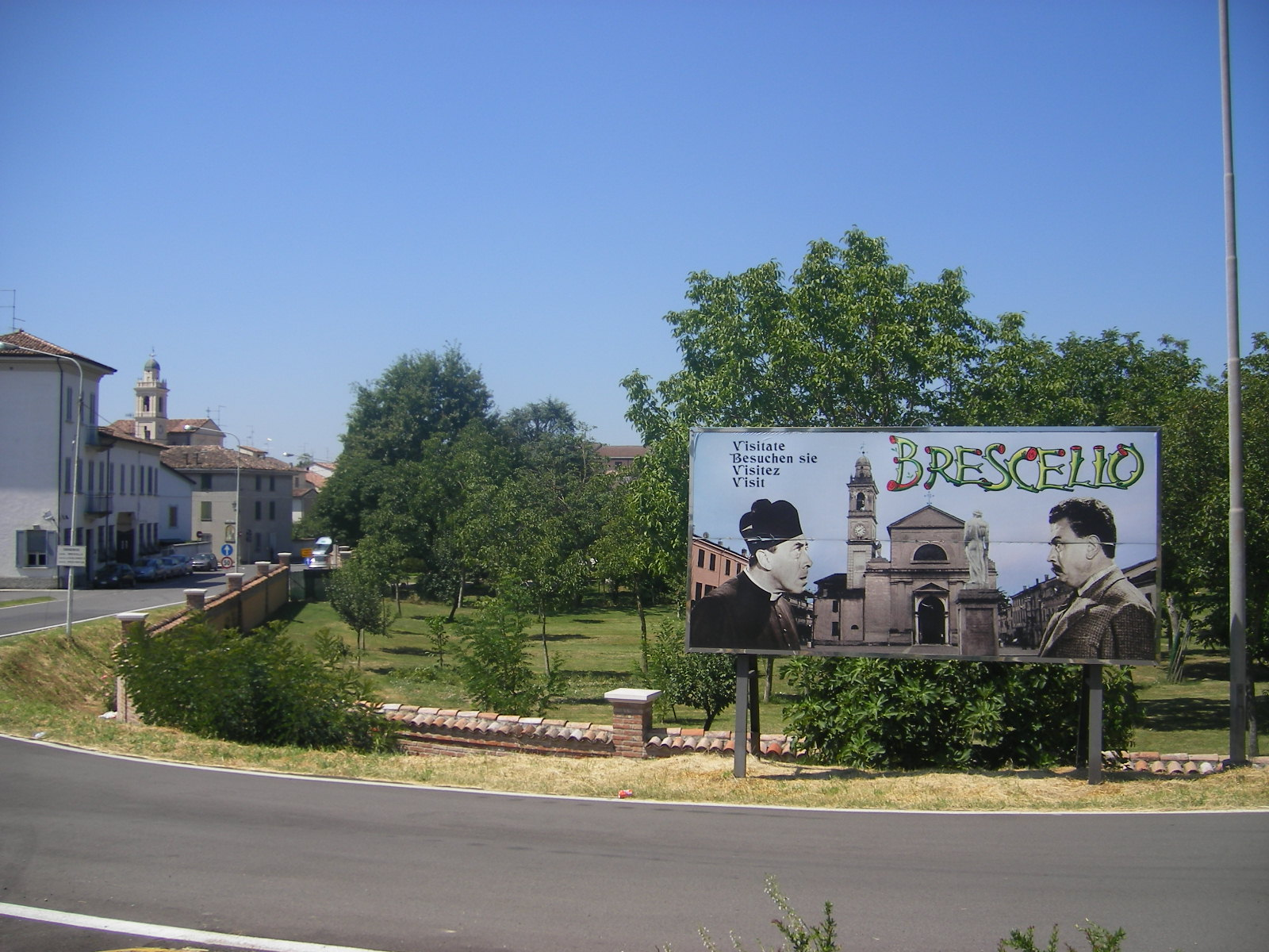 Brescello